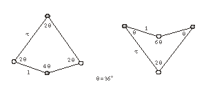 Penrose-féle rombuszos csempehalmaz, ami nem periodikusan csempézi a síkot